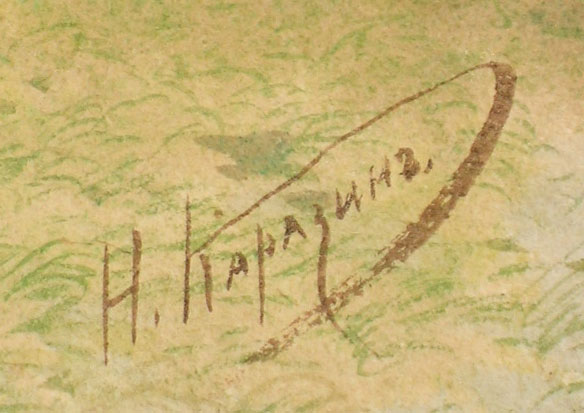 Автограф Каразина